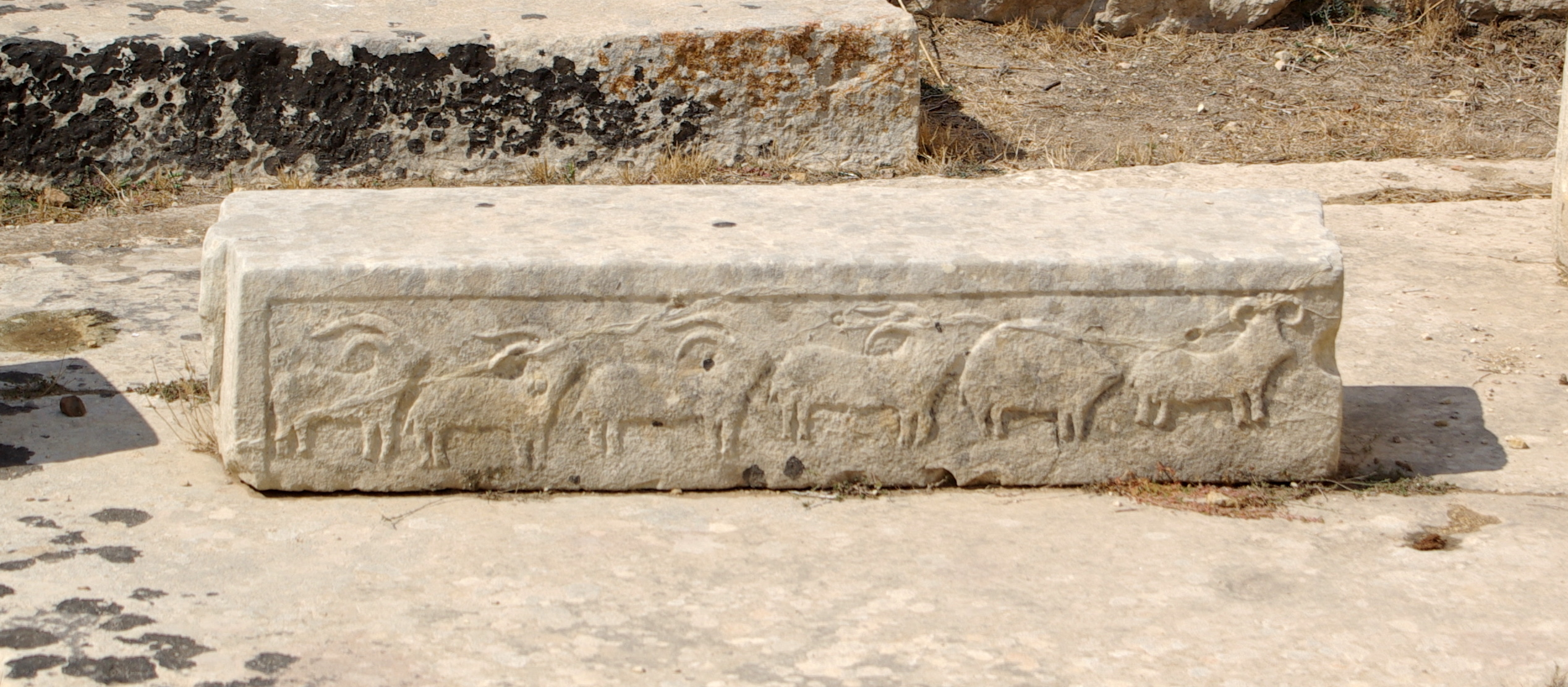 Malta, Tempel von Tarxien, Stein mit Widdern und einem Schwein. Kopie, das Original befindet sich im National Museum of Archaeologie in Valetta.